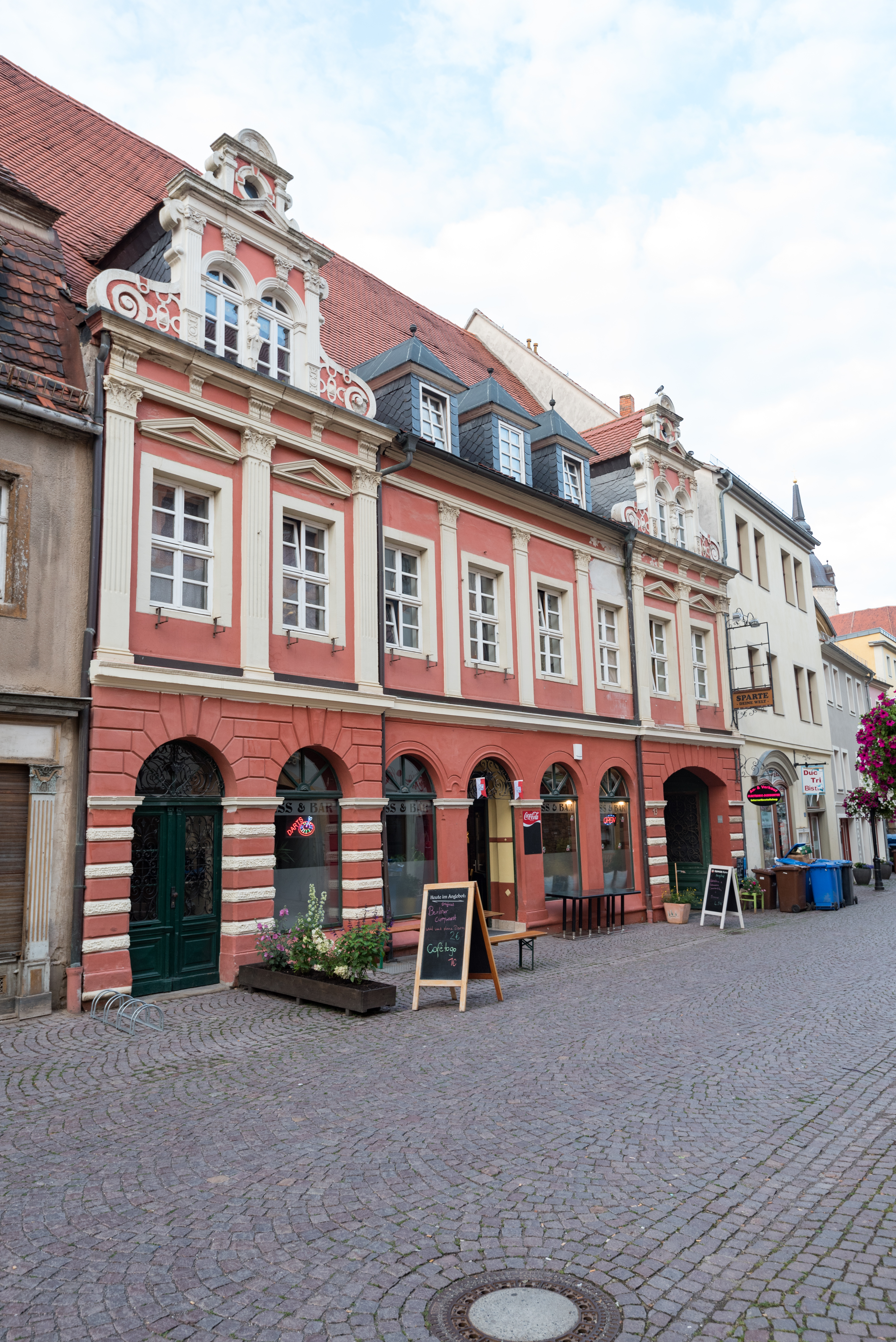 Naumburg (Saale), Salzstraße 13